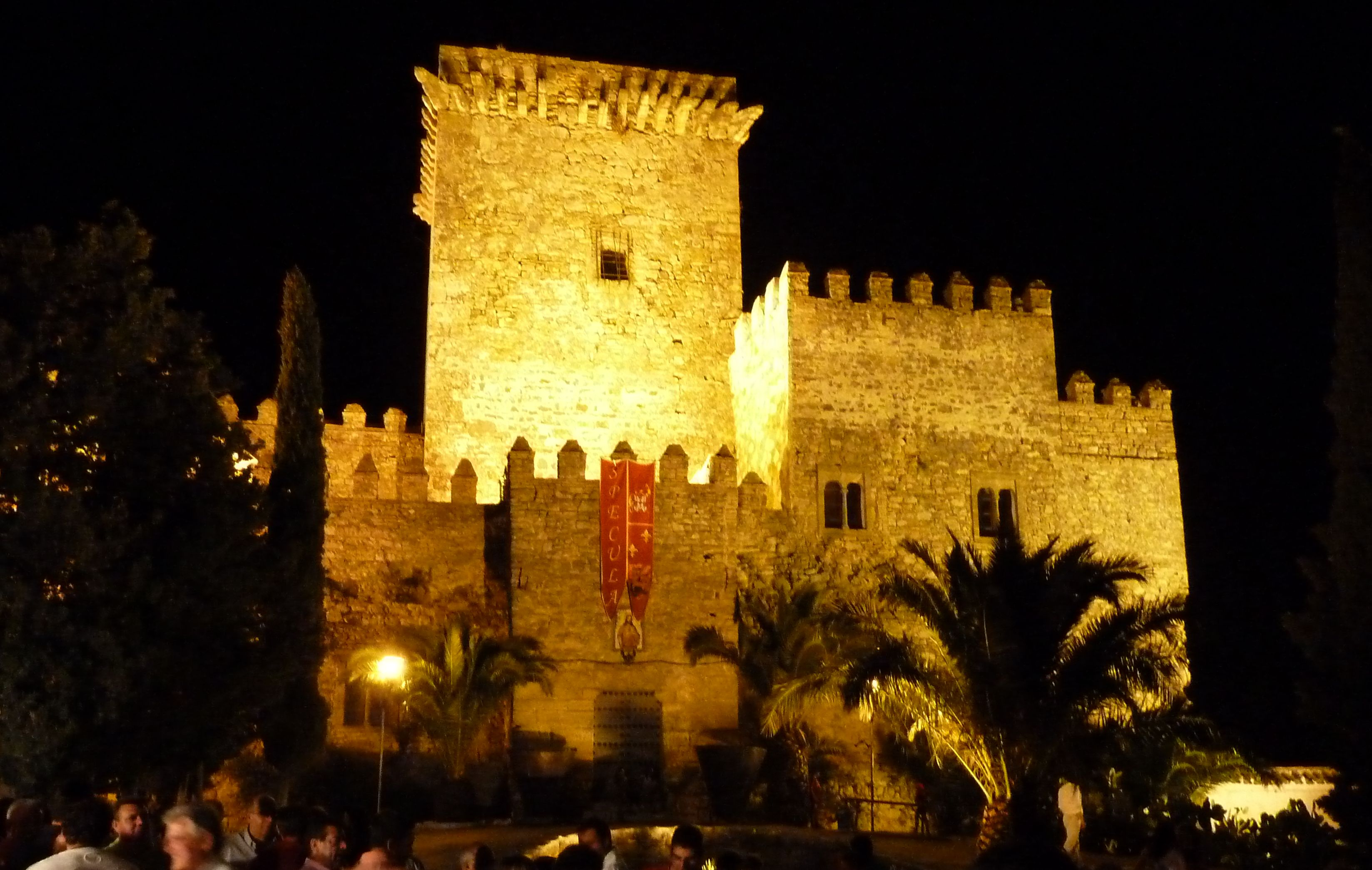 Castillo de Espejo, también conocido como Castillo de Alcalat